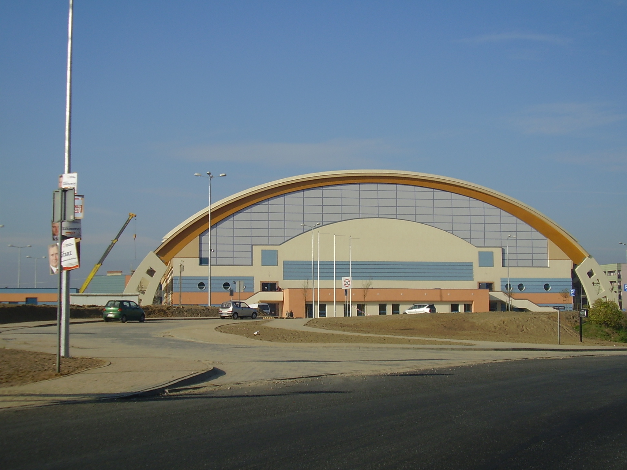 Nowa Hala Sportowo-Widowiskowa na Dobrzecu w Kaliszu. Zdjęcie z 21.10.2006r